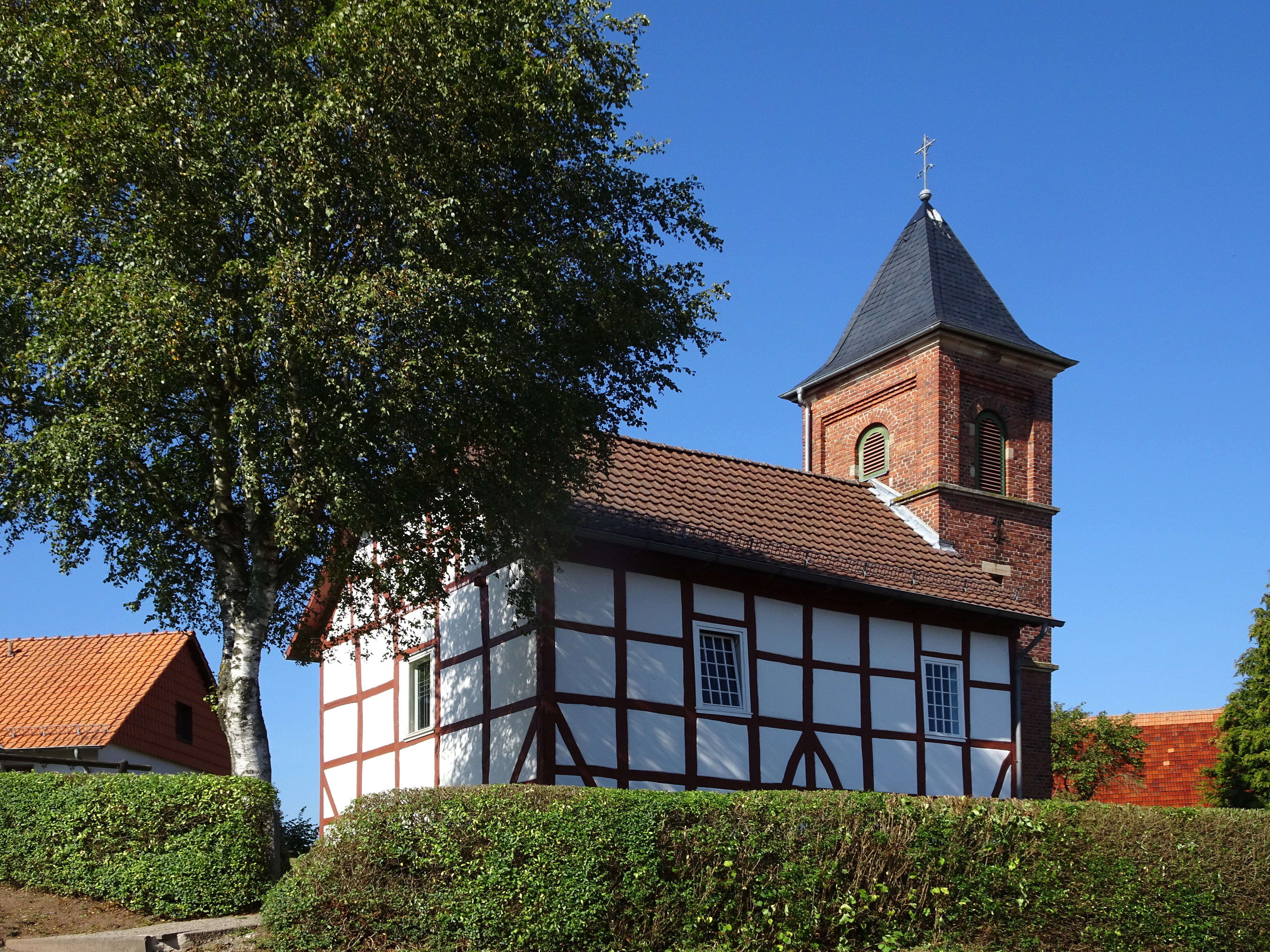 Die evangelische Kirche in Wölfterode. Wölfterode ist ein Stadtteil von Sontra im nordhessischen Werra-Meißner-Kreis. "Ins Jahr 1715 datierte kleine Dorfkirche in konstruktiver Fachwerkkonfiguration über einem massiven Sockel. Dem Schiff ist ein im Jahr 1900 fertiggestellter, dreigeschossiger Turm aus Backsteinmauerwerk vorgelagert, dessen Glockengeschoß sich in rundbogigen Schallarkaden öffnet." Text aus: Denkmaltopographie Bundesrepublik Deutschland, Kulturdenkmäler in Hessen. Werra-Meißner-Kreis I, Altkreis Eschwege. Peer Zietz, Thomas Wiegand, Braunschweig: Vieweg Verlag, 1991, ISBN 3-528-06240-1.